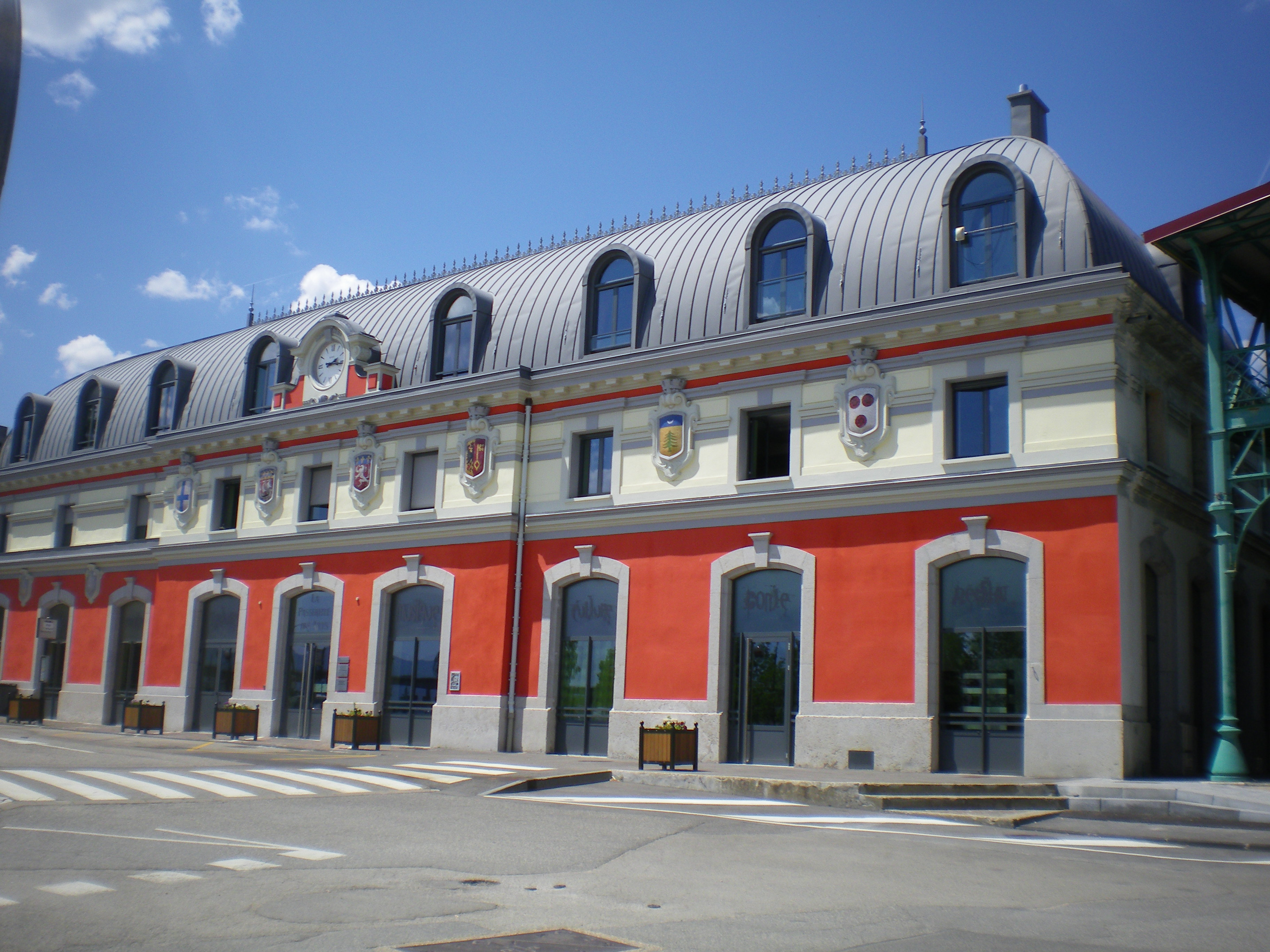 Pôle culturel comprenant la Médiathèque (Louis Miraillet) et le Conservatoire à Rayonnement Communal